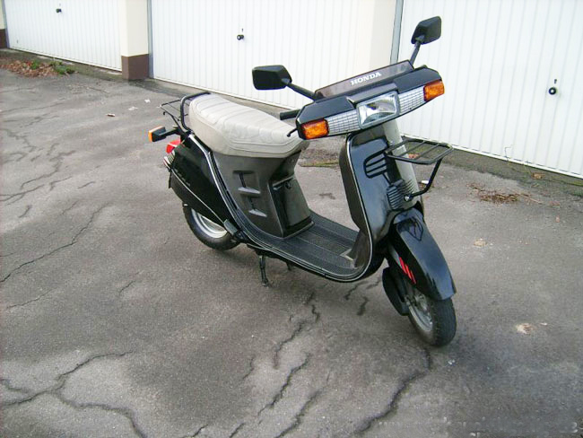 Meine Honda lead NH50